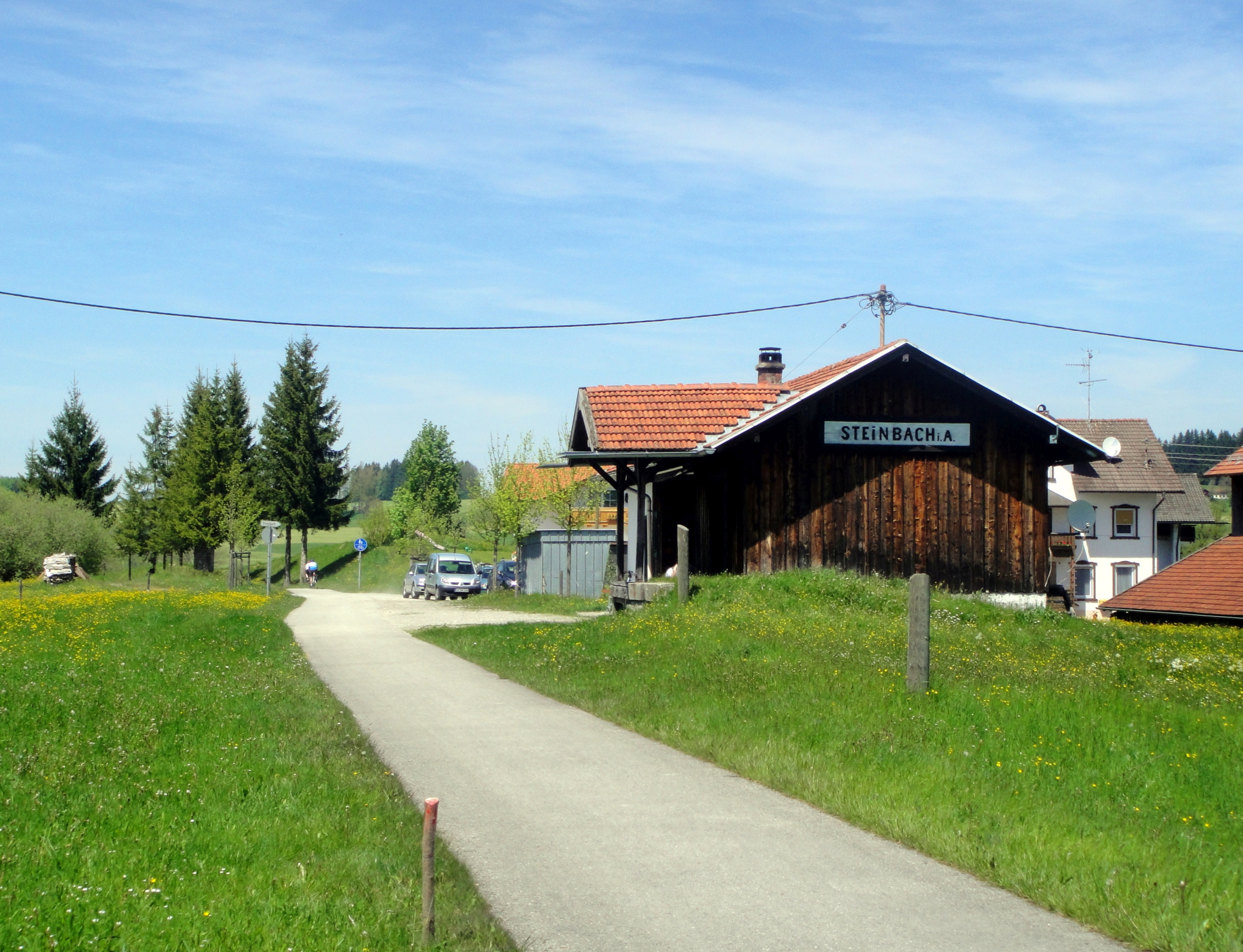 Ehemalige Bahnstation Steinbach im Allgäu an der Dampflokrunde, Gemeinde Stötten am Auerberg